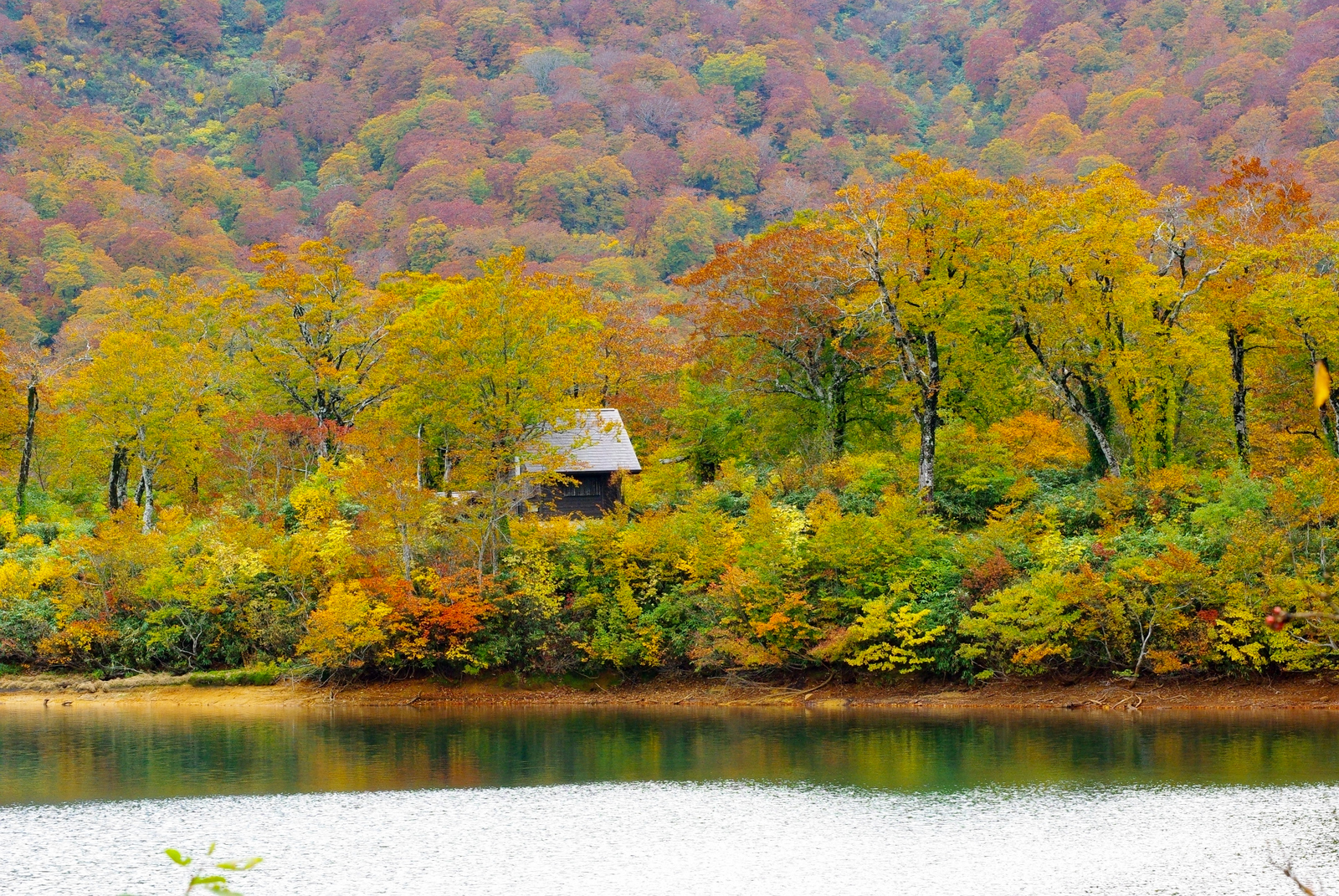 須川湖 Lake Sukawa